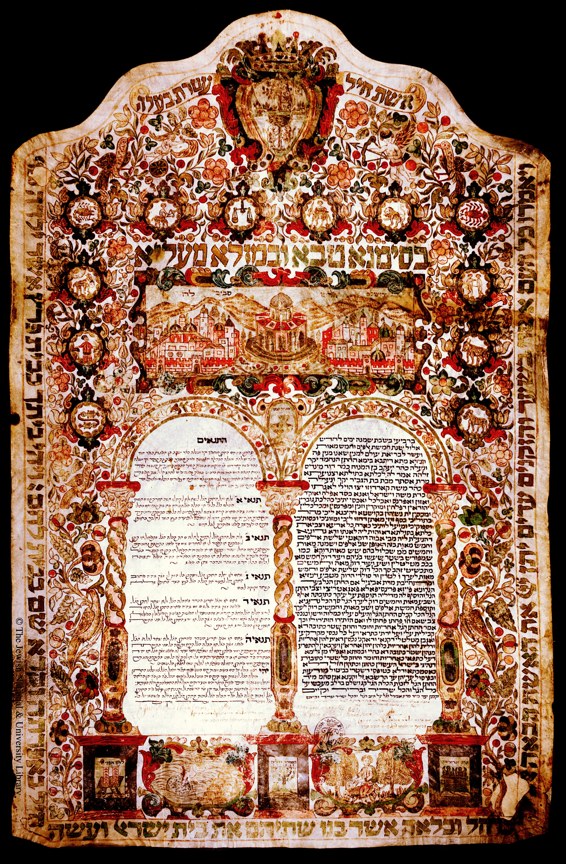 כתובה מוונציה העד שמחה קאלימאני מחבר הספר תוכחת